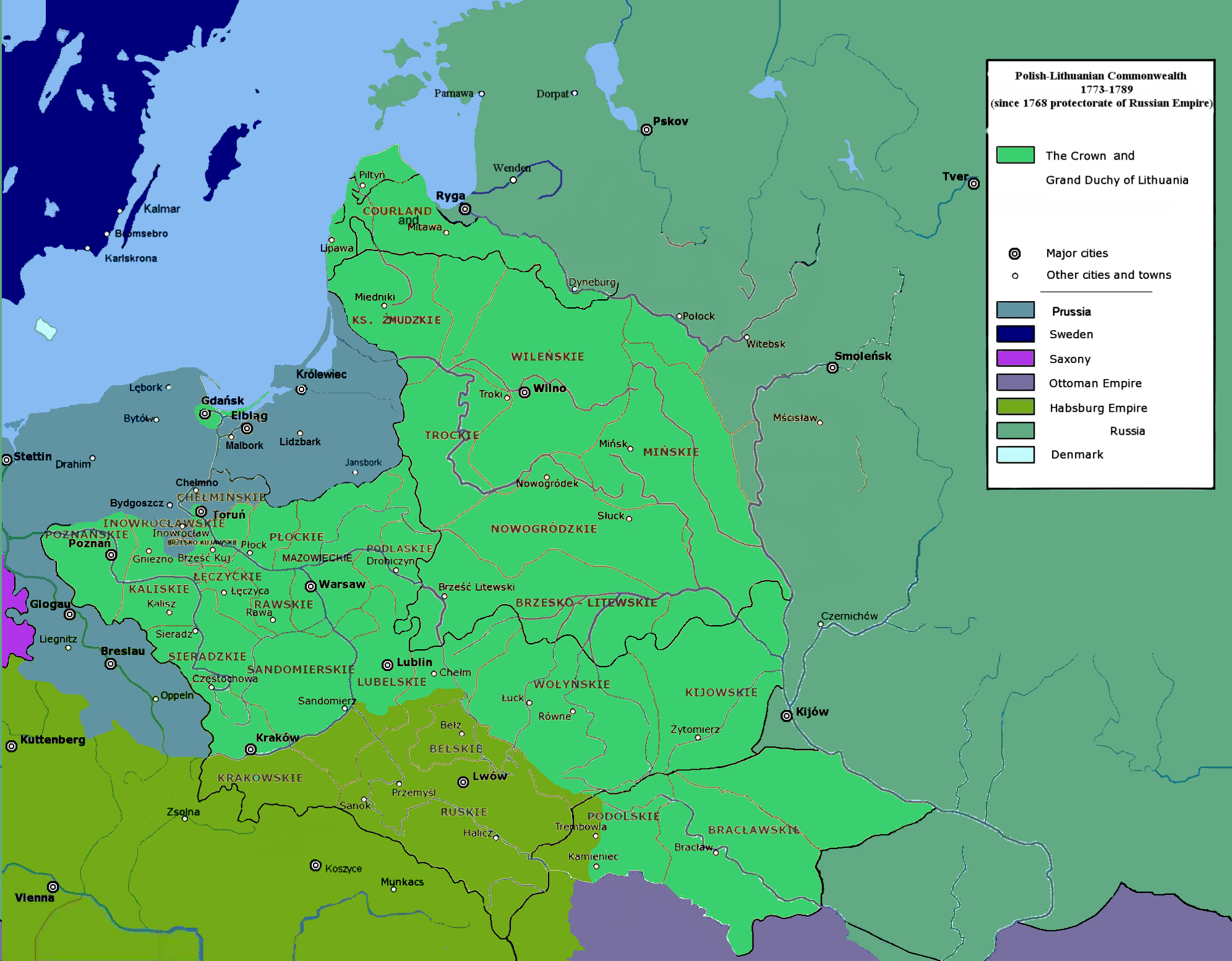 Ziemie polskie po I rozbiorze